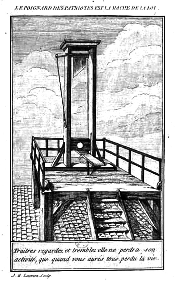 dessin d'une guillotine